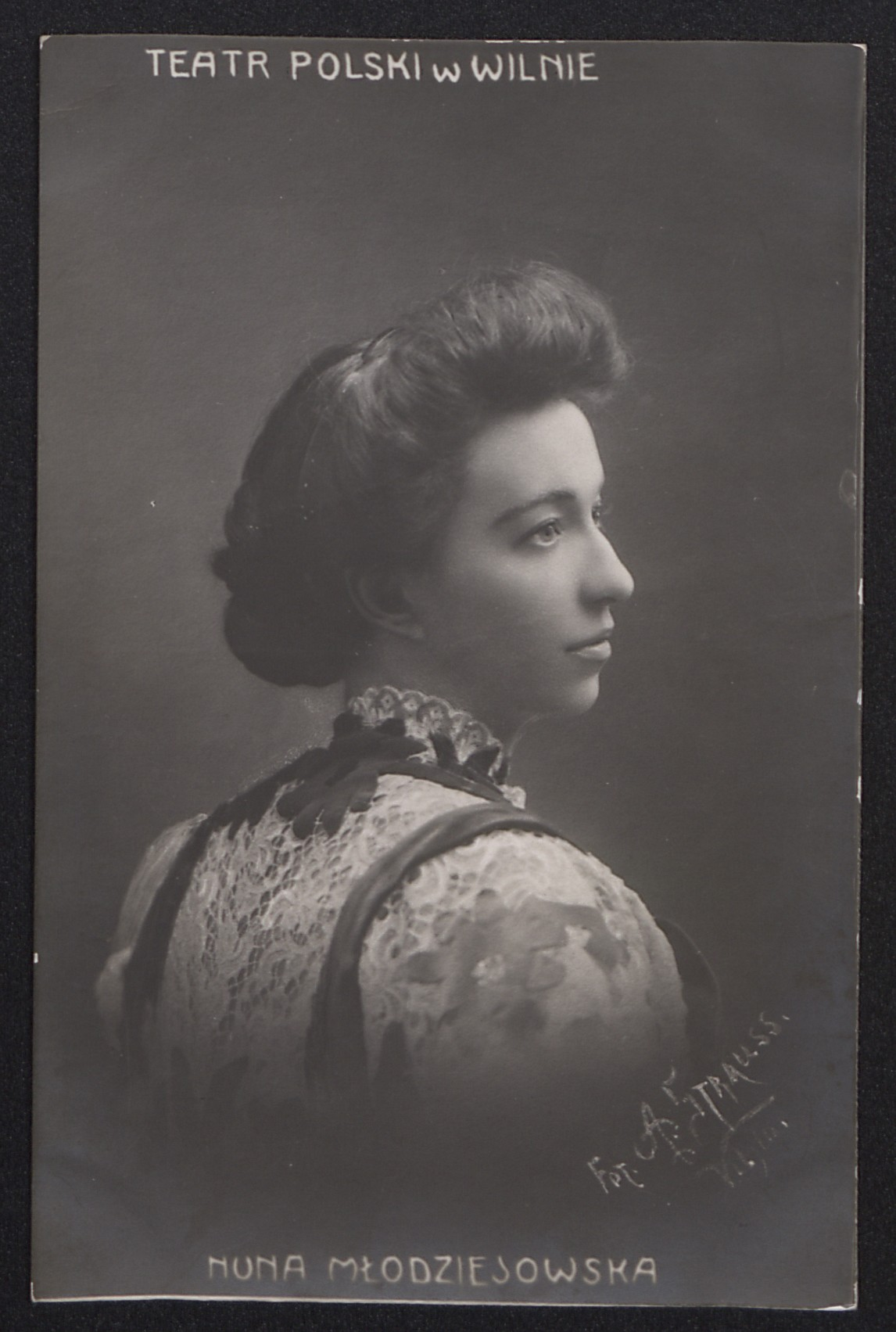 Nuna Młodziejowska, ok. 1908 r.